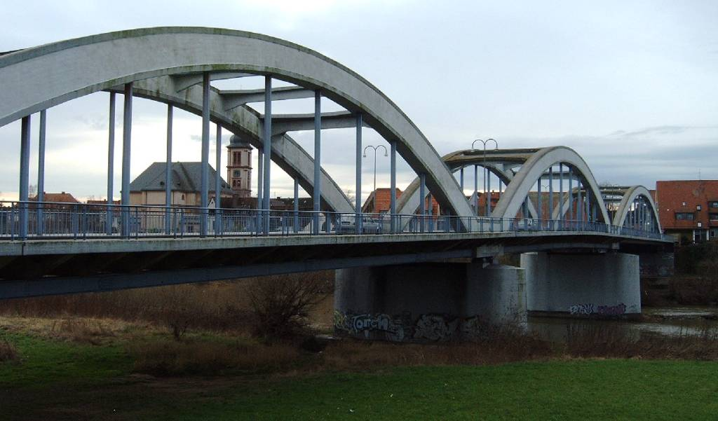 Mannheim-Seckenheim, Neckarbrücke nach Ilvesheim